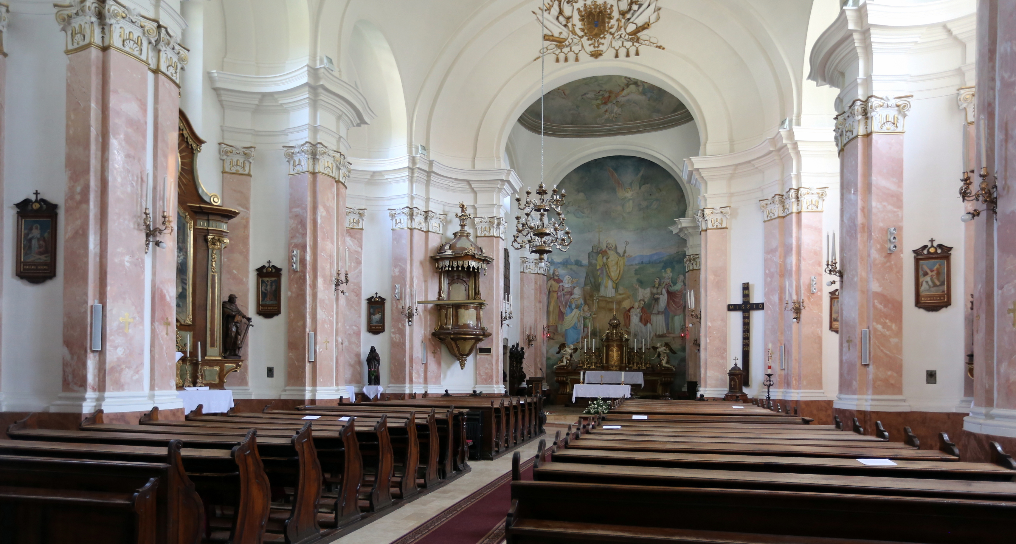 Szent Adalbert-plébániatemplom, Hatvan